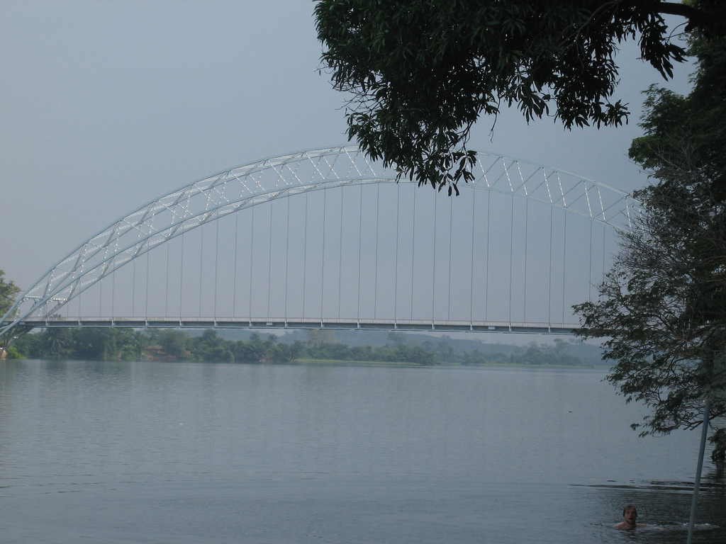 Brücke über den Volta in der Volta-Region in der Nähe von Atimpoku. Geöffnet für den Straßenverkehr und Fußgänger